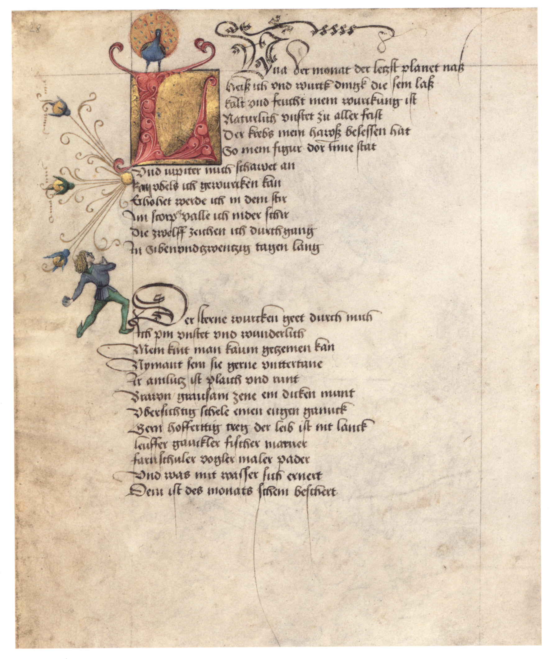 Mittelalterliches Hausbuch von Schloss Wolfegg Fol. 16v: Text zum folgenden Bild "Luna und ihre Kinder" (fol. 17r)